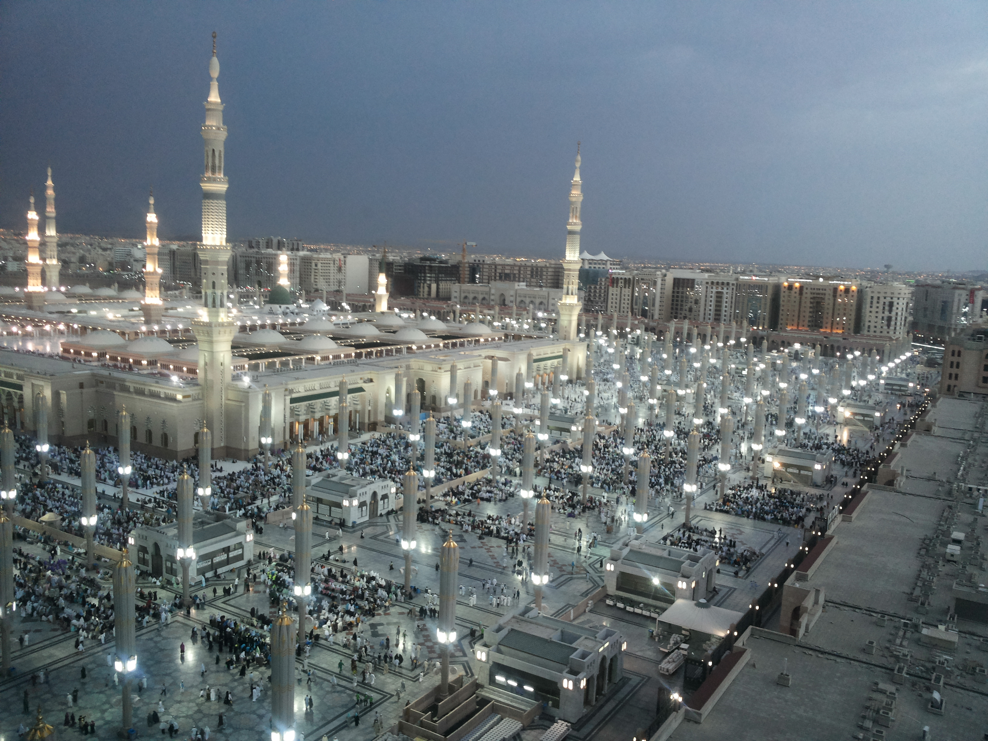 المسجد النبوي الشريف والصورة مأخوذة من الدور الرابع عشر فندق أنوار المدينة موفينبيك